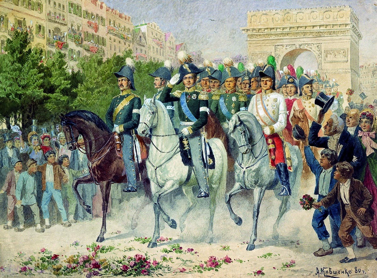 Это картина русского художника Алексея Кившенко: «Вступление русских войск в Париж в 1814 году»